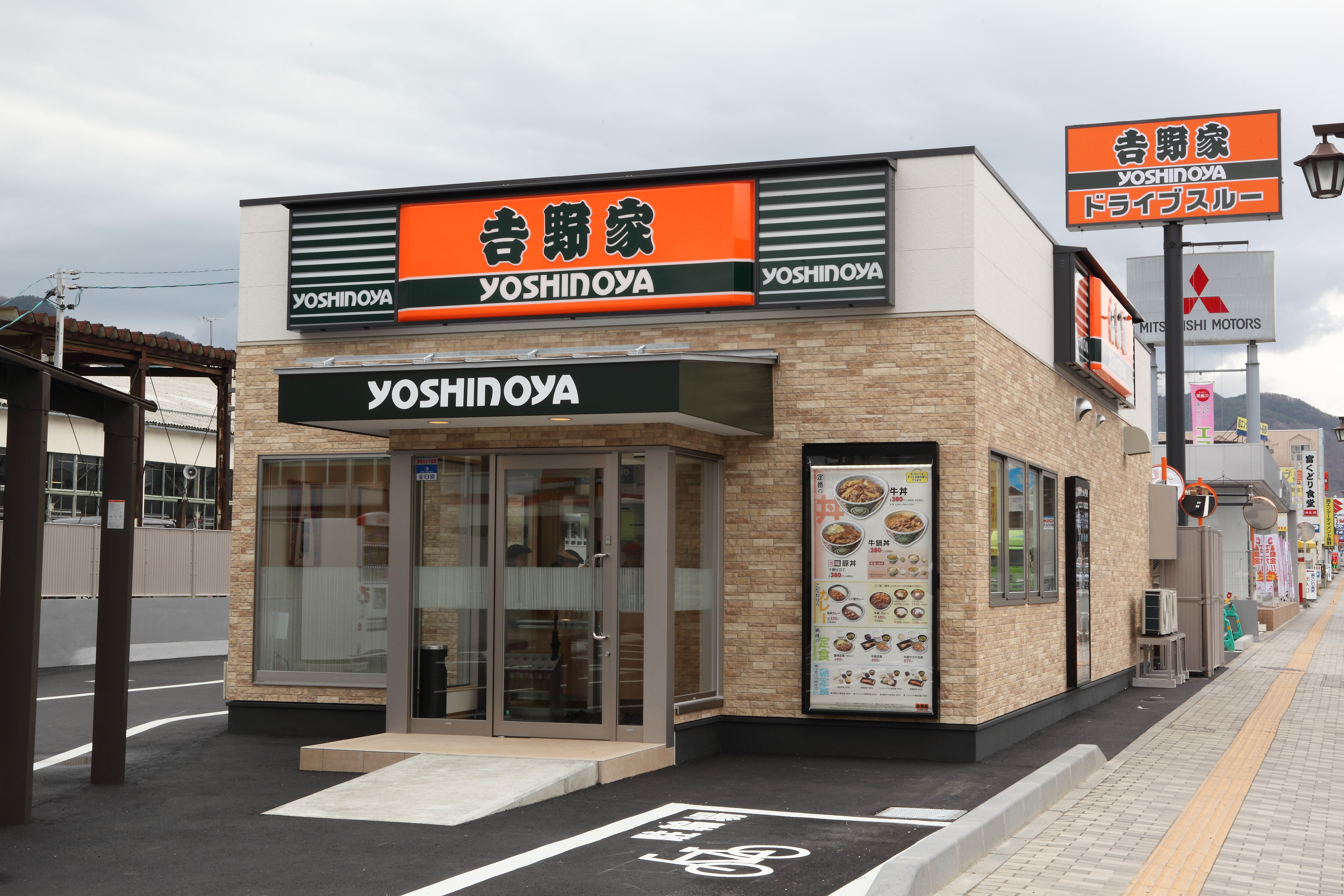 店舗イメージ